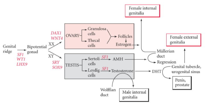 Estas cascadas conducen a la formación de los fenotipos sexuales en mamíferos. La conversión de la cresta genital hacia una gónada bipotencial requiere de los genes LHX9, SF1 y WT1. La gónada bipotencial produce un fenotipo femenino, con el desarrollo de ovarios por la expresión los genes WNT4 y DAX1 y un fenotipo masculino, con el desarrollo de testículos por la expresión del gen SRY y de los genes autosómicos SOX9. El ovario produce células tecales y células de la granulosa, que son capaces de sintetizar estrógeno; bajo la influencia de esta hormona, el conducto de Müller se diferencia hacia el tracto reproductor femenino. Por su parte los testículos producen dos hormonas, la primera, es el factor inhibidor de Müller (AMH), que provoca la regresión de los conductos Müller, la segunda es la testosterona, que provoca la diferenciación del conducto de Wolff hacia genitales masculinos internos. En la región urogenital, la testosterona es convertida hacia dihidrotestosterona (DHT), que es la encargada causa la morfogénesis del pene y de la glándula prostática.